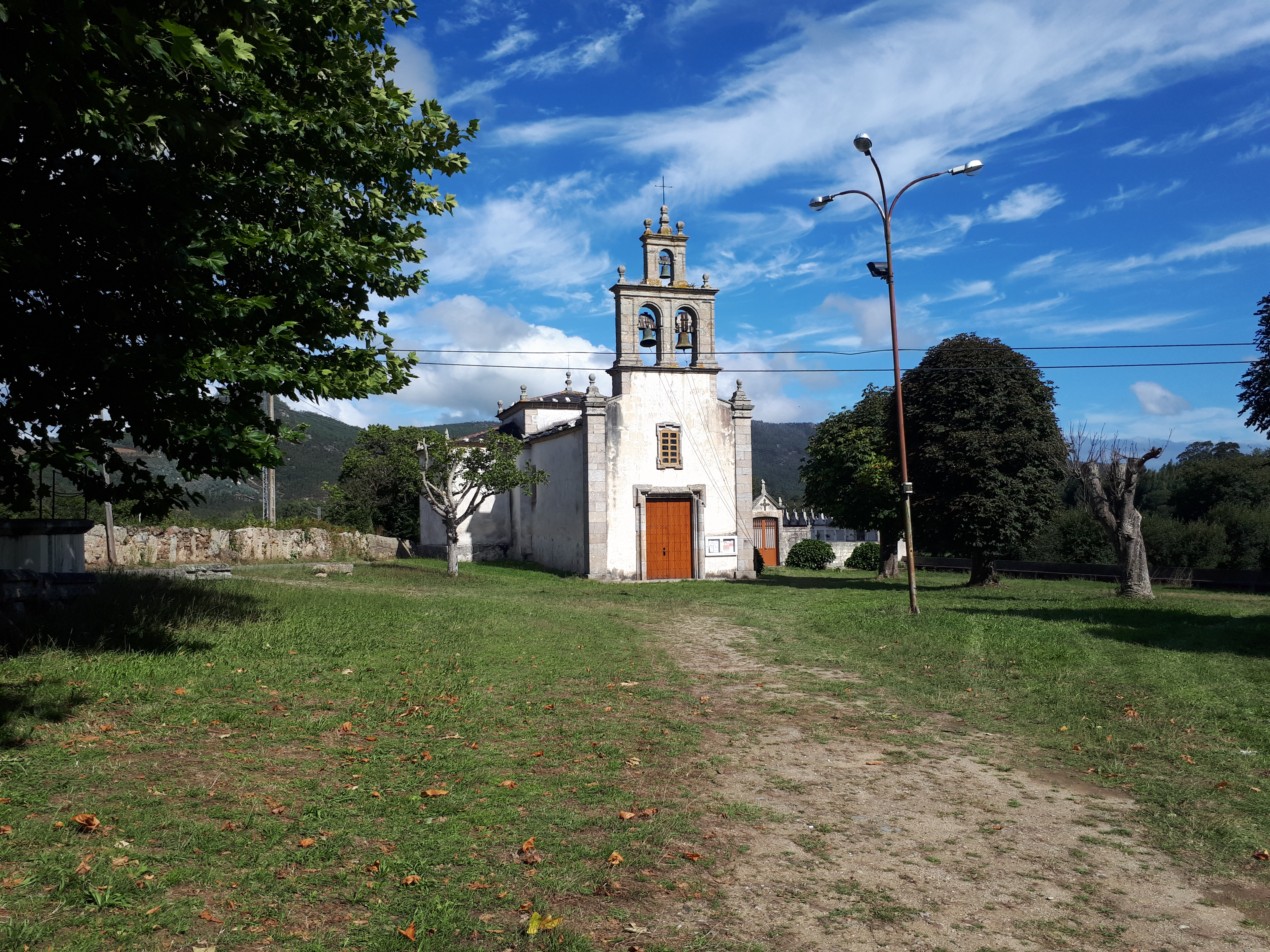 Igrexa levantada na primeira metade do século XVIII, debe a súa construción a Fernando Mosquera de Lanzós, reitor de Fonseca.